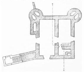 Ras Gimb